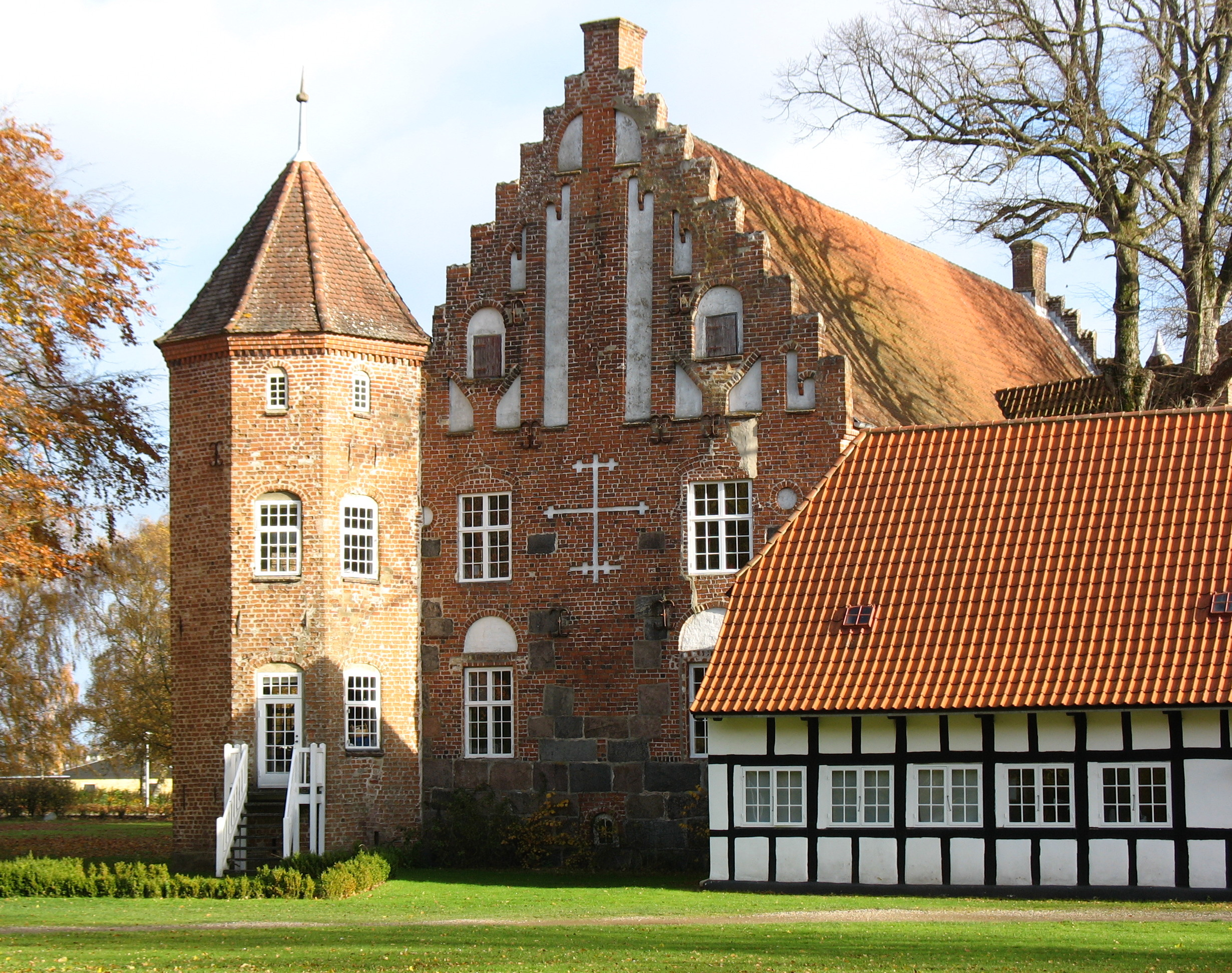 Krabbesholm herregård